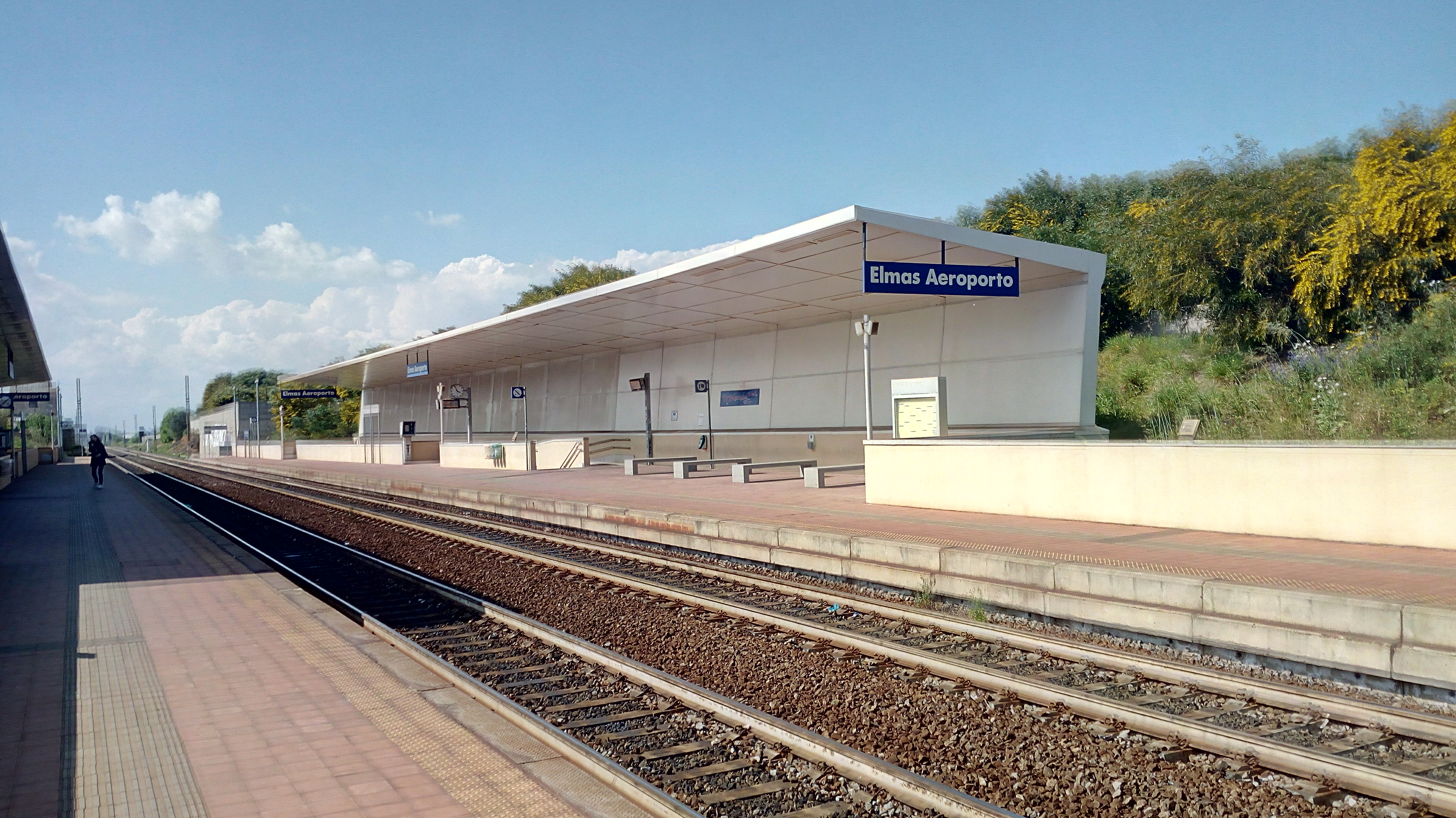 Vista sul binario 1 (dal binario 2) della stazione ferroviaria di Elmas Aeroporto.